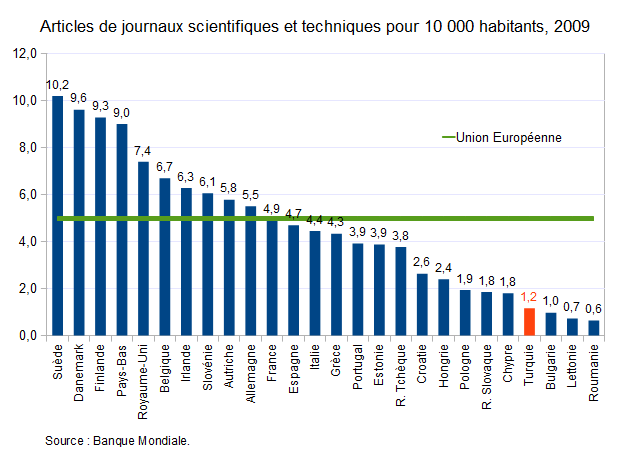 Articles de journaux scientifiques et techniques 2009 - Banque Mondiale